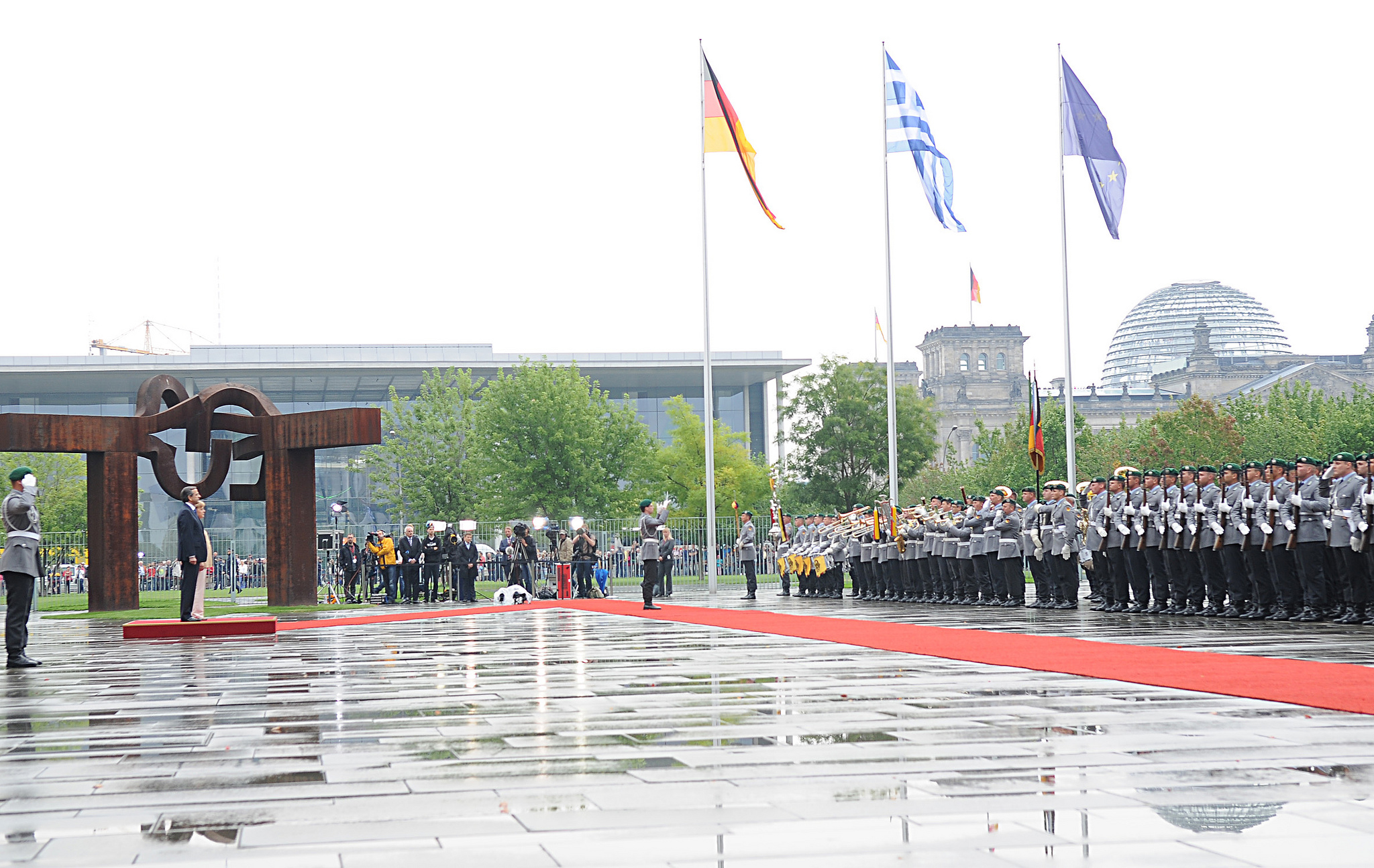 Angela Merkel - Αντώνης Σαμαράς